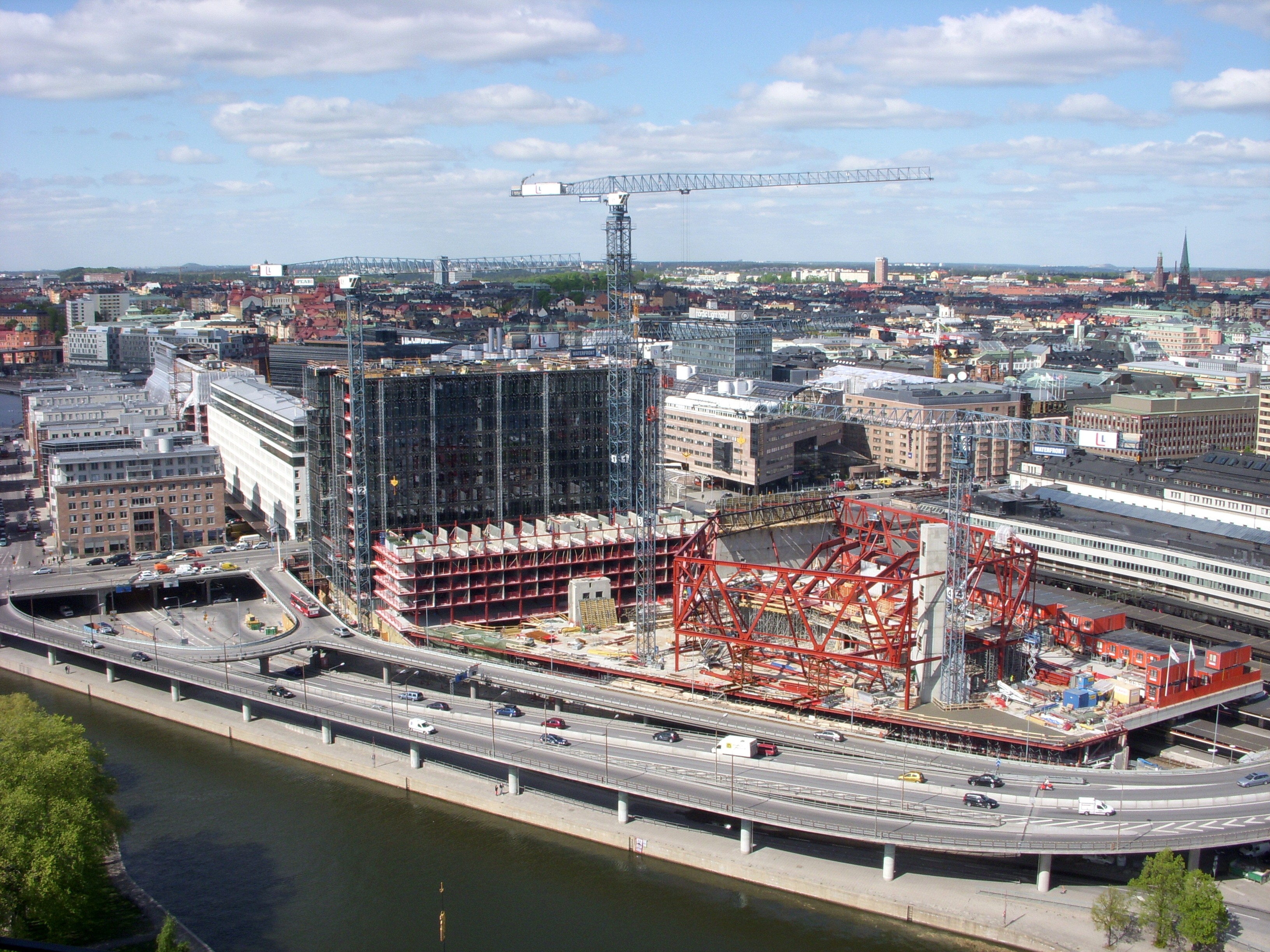 Waterfront Building i Stockholm